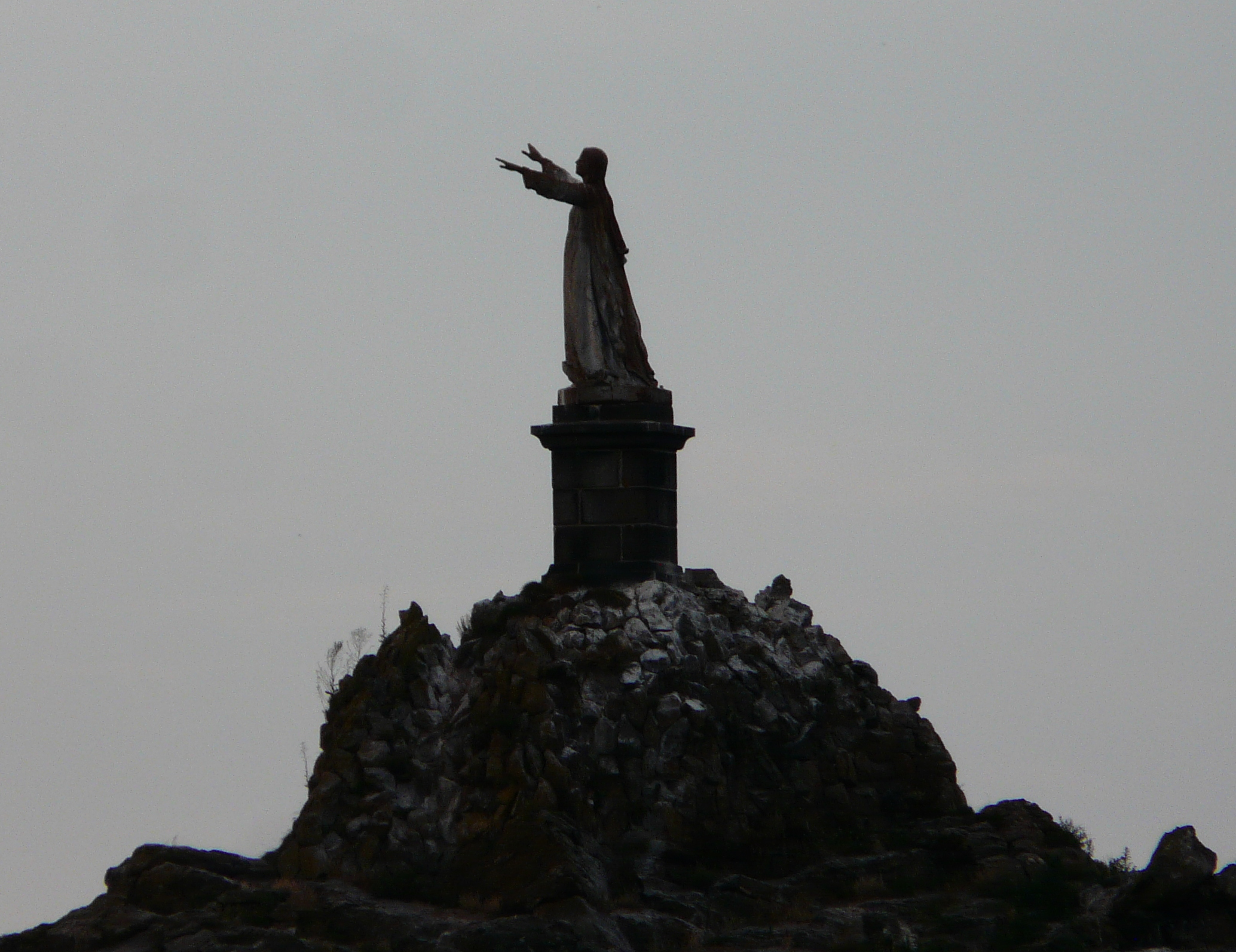 Les mains tournées vers la mer, elle semble essayer de la dominer